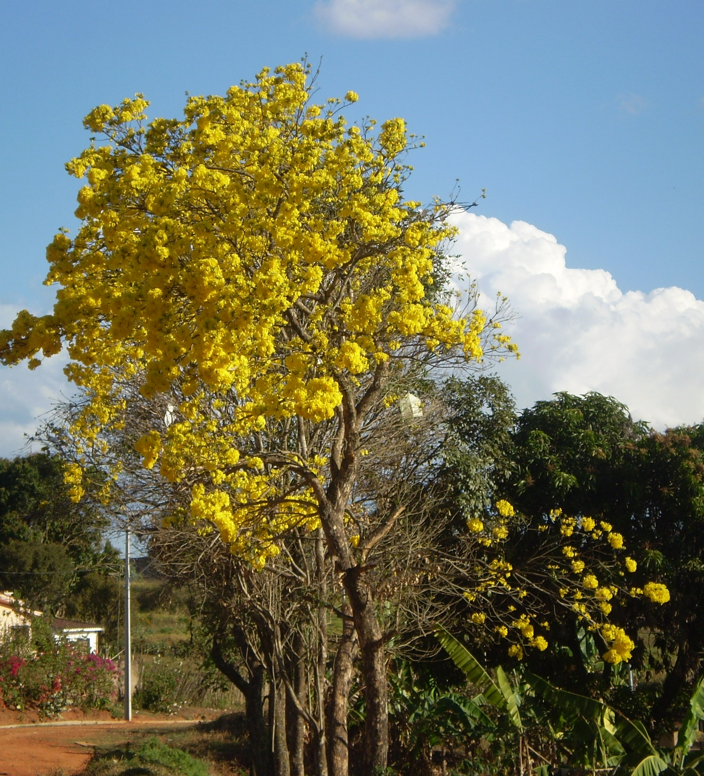 ipe florido em setembro